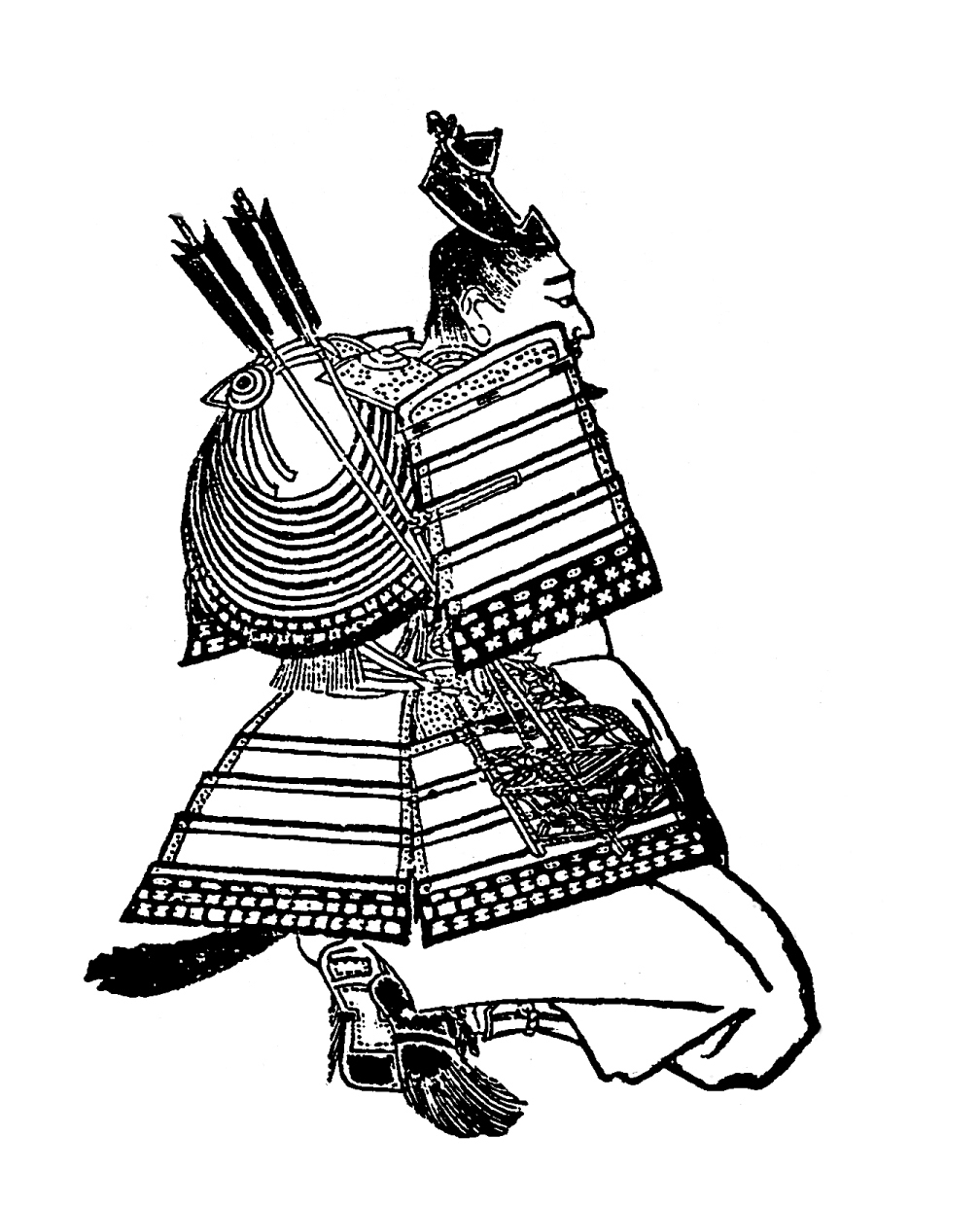 平賀義信、平安時代末期 - 鎌倉時代初期の武将。／江戸時代『前賢故実』より。画：菊池容斎。